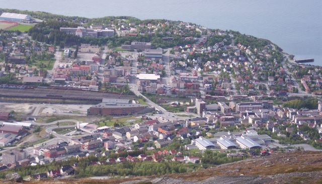 Narvik Description in de wikipedia Narvik von Oben, eigenes Bild, GFDL